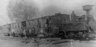 Zur Erinnerung an die Eröffung der Ortelsburger Kleinbahn